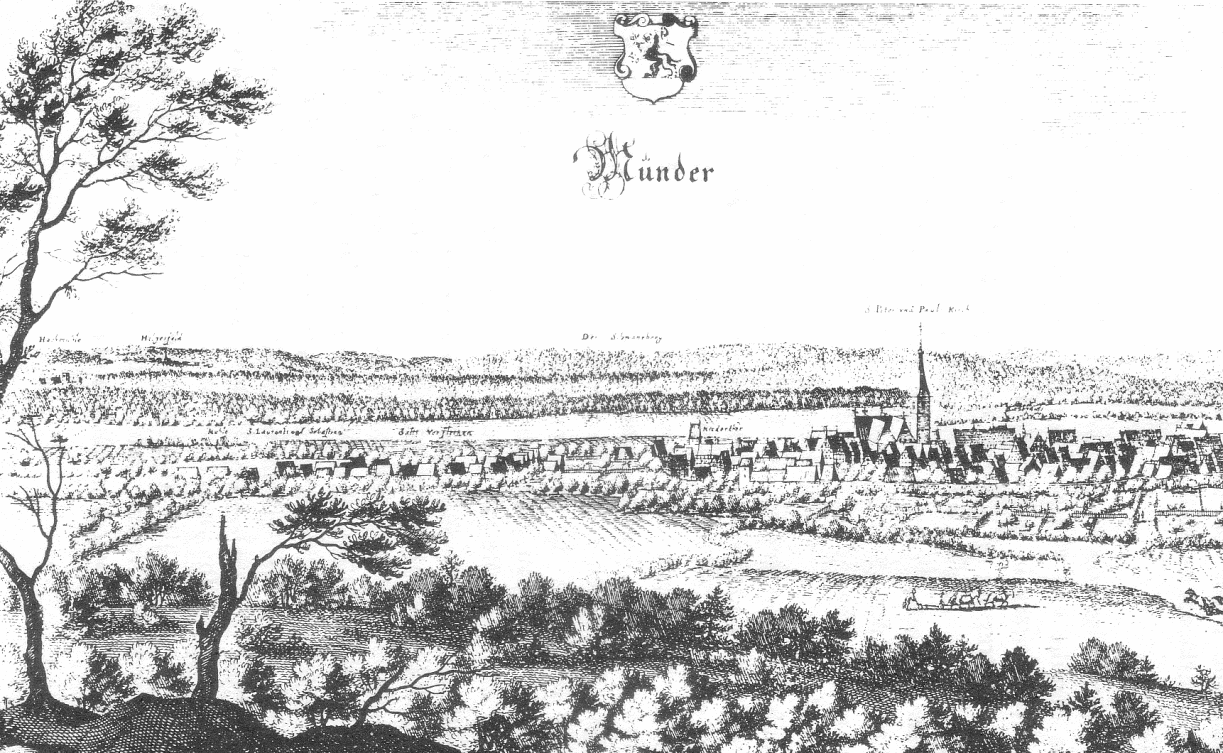 Bad Münder als Merian Stich um 1650